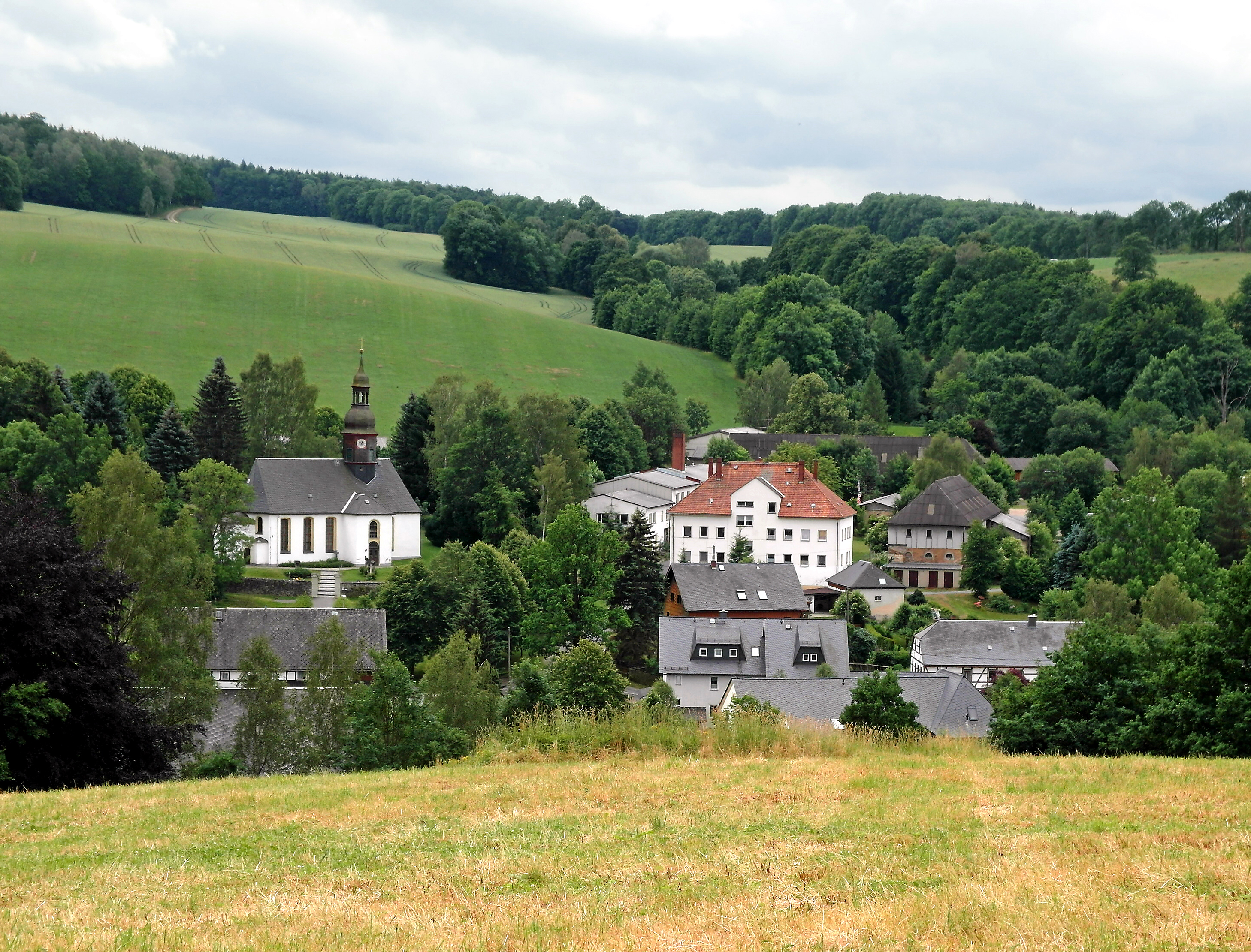 26.06.2017 09619 Mulda/Sa.: Sicht von Norden zur Kirche (GMP: 50.806157,13.419899) und zum Erbgericht-Gut (Erbgerichtsweg 2, GMP: 50.806275,13.419093). [SAM0529.JPG]20170626105DR.JPG(c)Blobelt